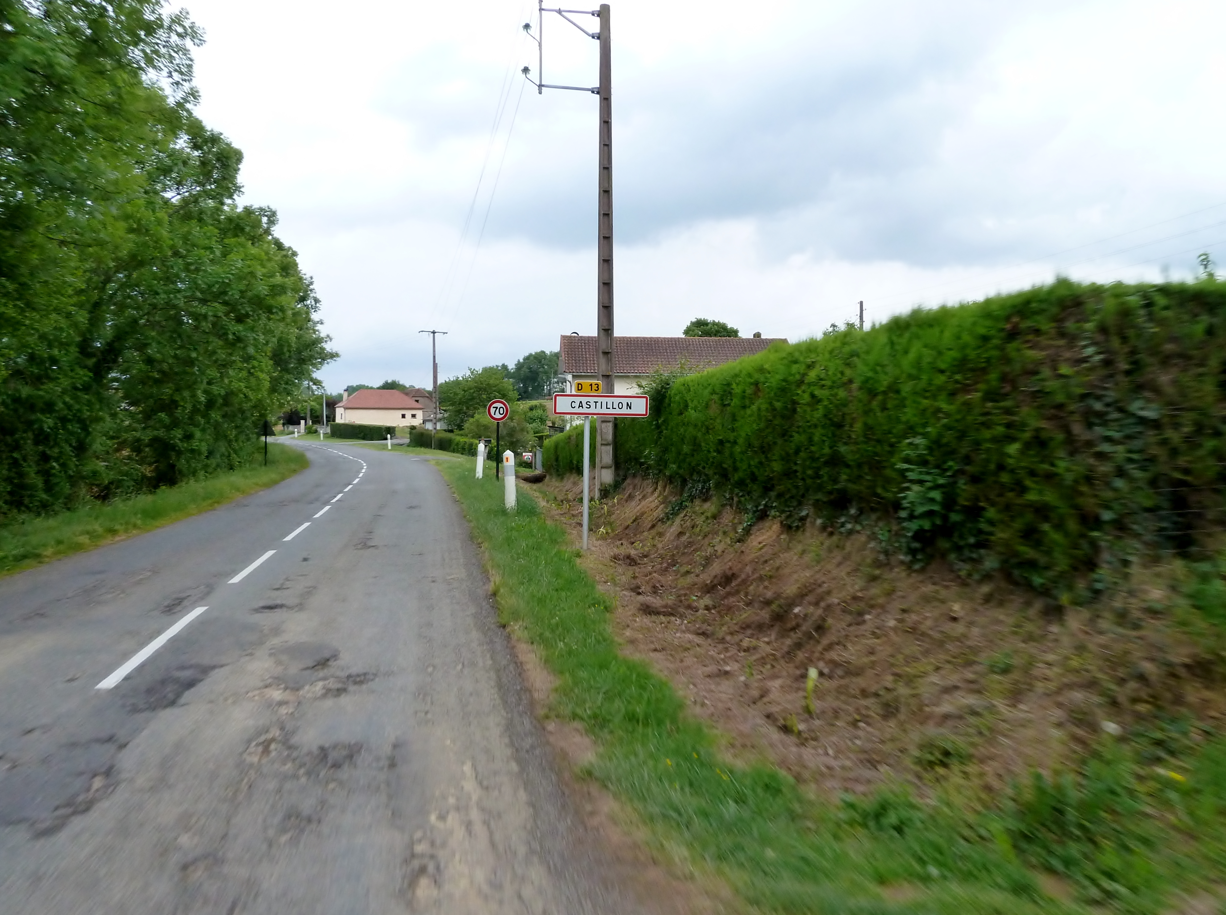 Entrée dans Castillon (Canton de Lembeye)